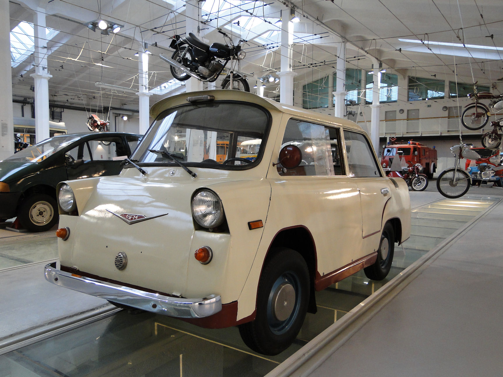 Samochód "Smyk". Eksponowany w Muzeum Techniki i Komunikacji w Szczecinie. W samochodzie właściciel dokonał kilku przeróbek m.in. wydłużył auto, wstawił dodatkową parę drzwi, zamontował drugą wycieraczkę oraz kierunkowskazy.